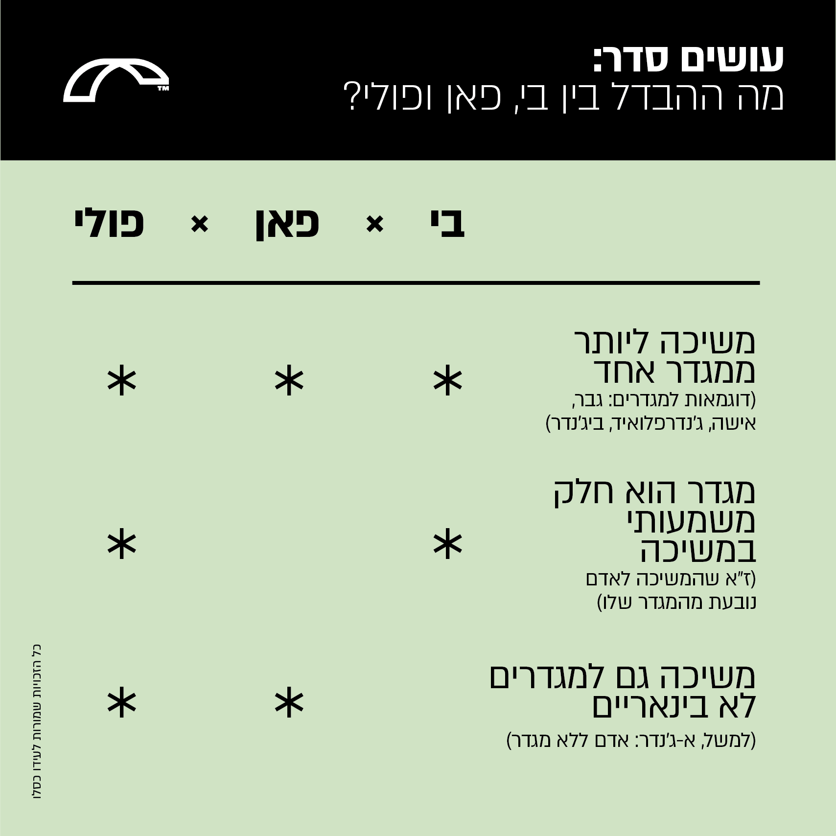 ההבדלים בין ביסקסואליות, פאנסקסואליות ופוליסקסואליות, מטעם ארגון Rainbow